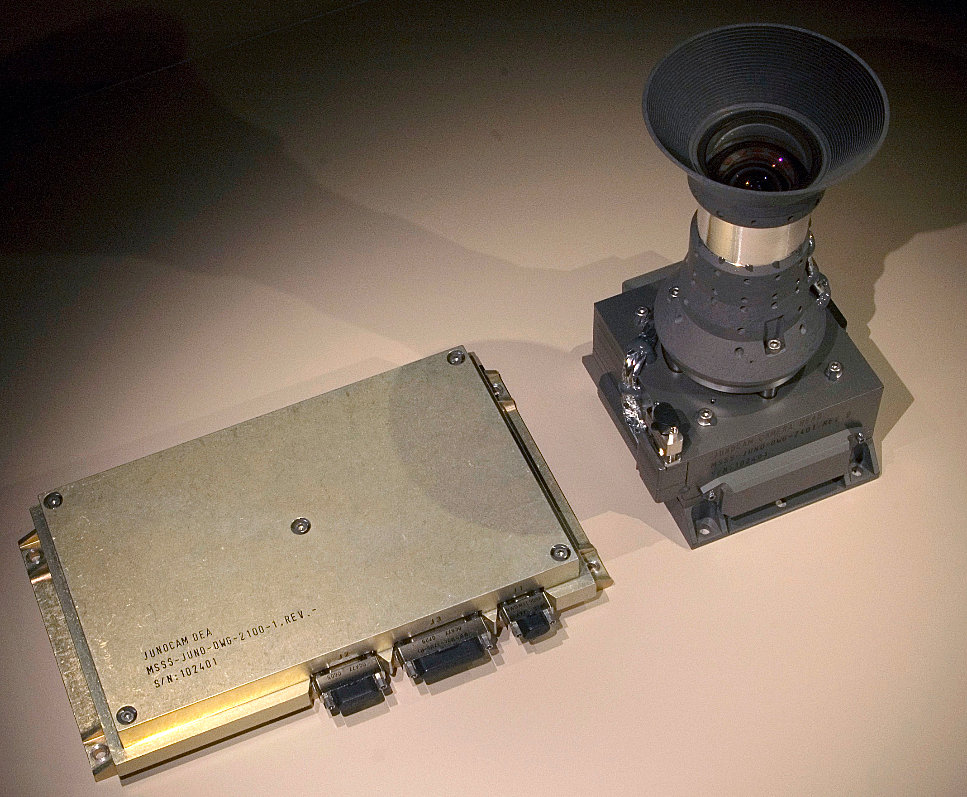 Caméra Junocam de la sonde spatiale JUNO de la NASA